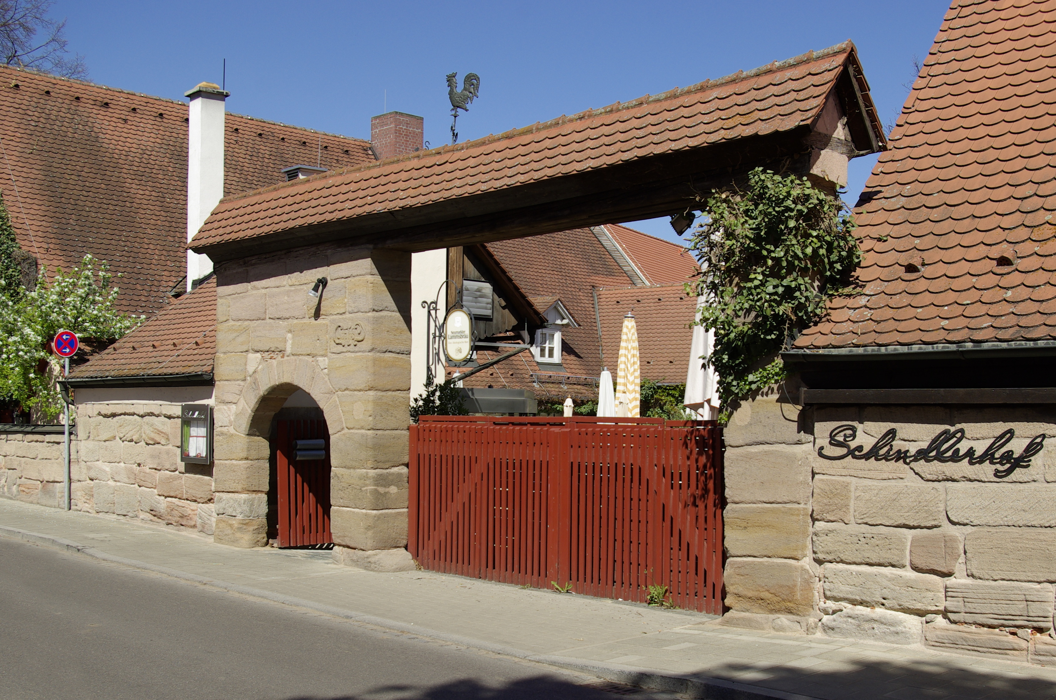 Historische Hofeinfahrt des Schindlerhofs, Steinacher Straße 8, im Nürnberger Stadtteil Boxdorf.